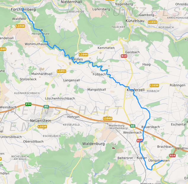 carte réalisée sur umap This map may be incomplete, and may contain errors. Don't rely solely on it for navigation.